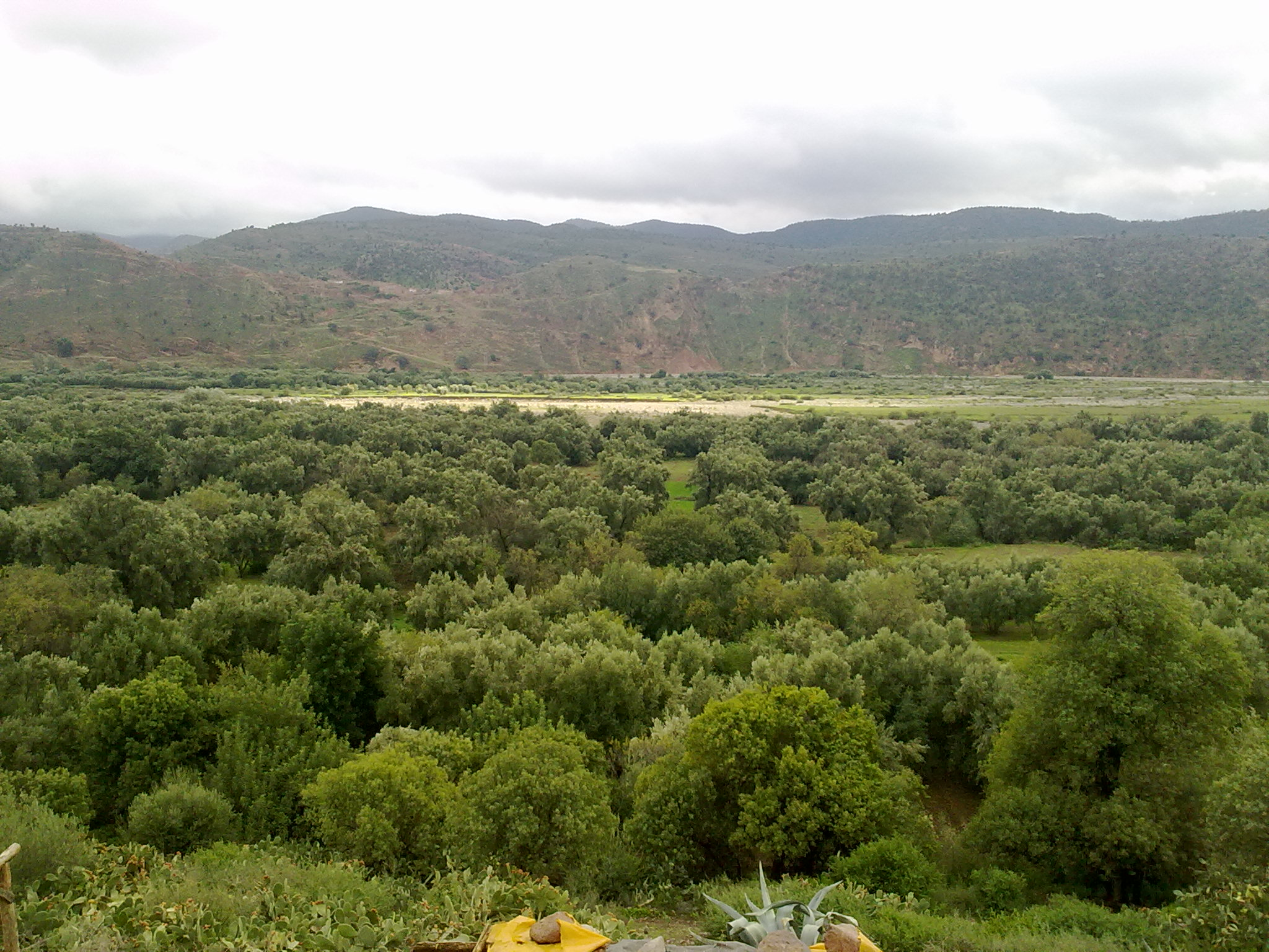 Taroudant